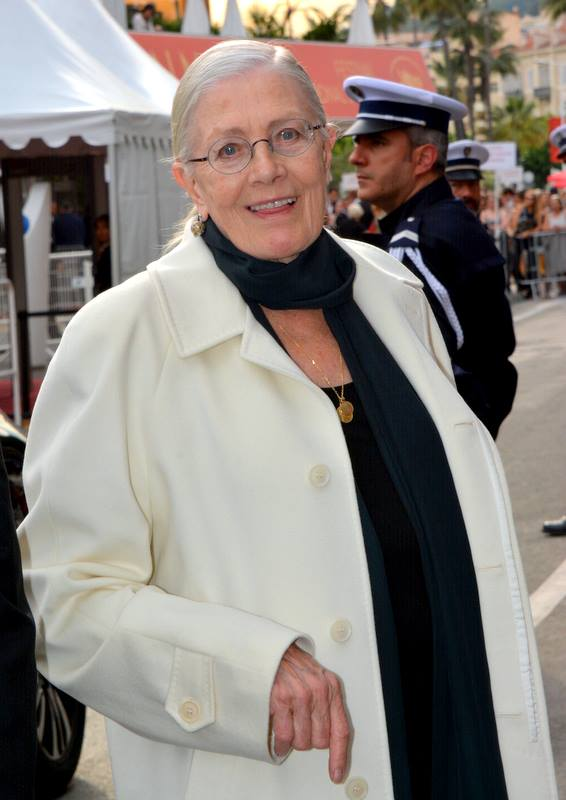 Vanessa Redgrave au festival de Cannes